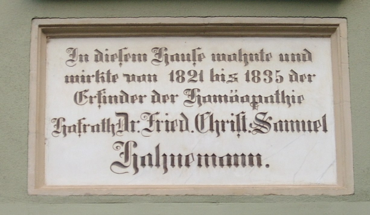 Ehemaliges Wohnhaus von Samuel Hahnemann Köthen (Anhalt) in der Wallstraße. Hier lebte Hahnemann von 1821 bis 1835. Erbaut wurde das Gebäude im 18. Jahrhundert.